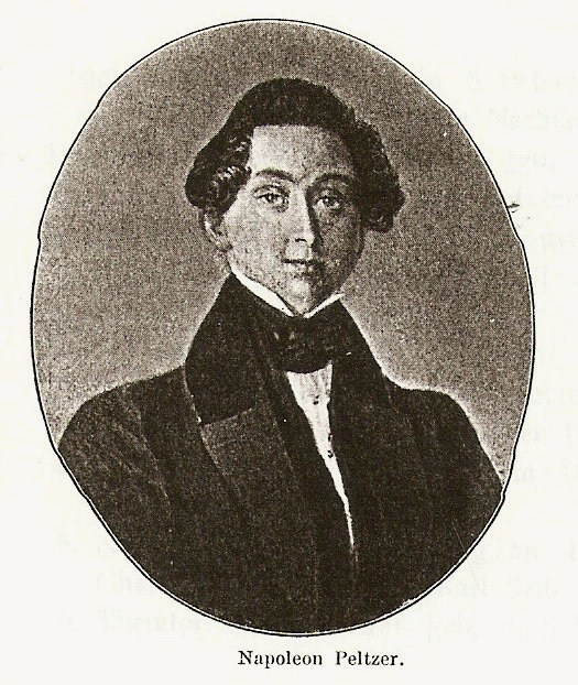 Scan einer in Maccos Buch abgedruckten Ablichtung eines Portraits aus dem Familienbesitz